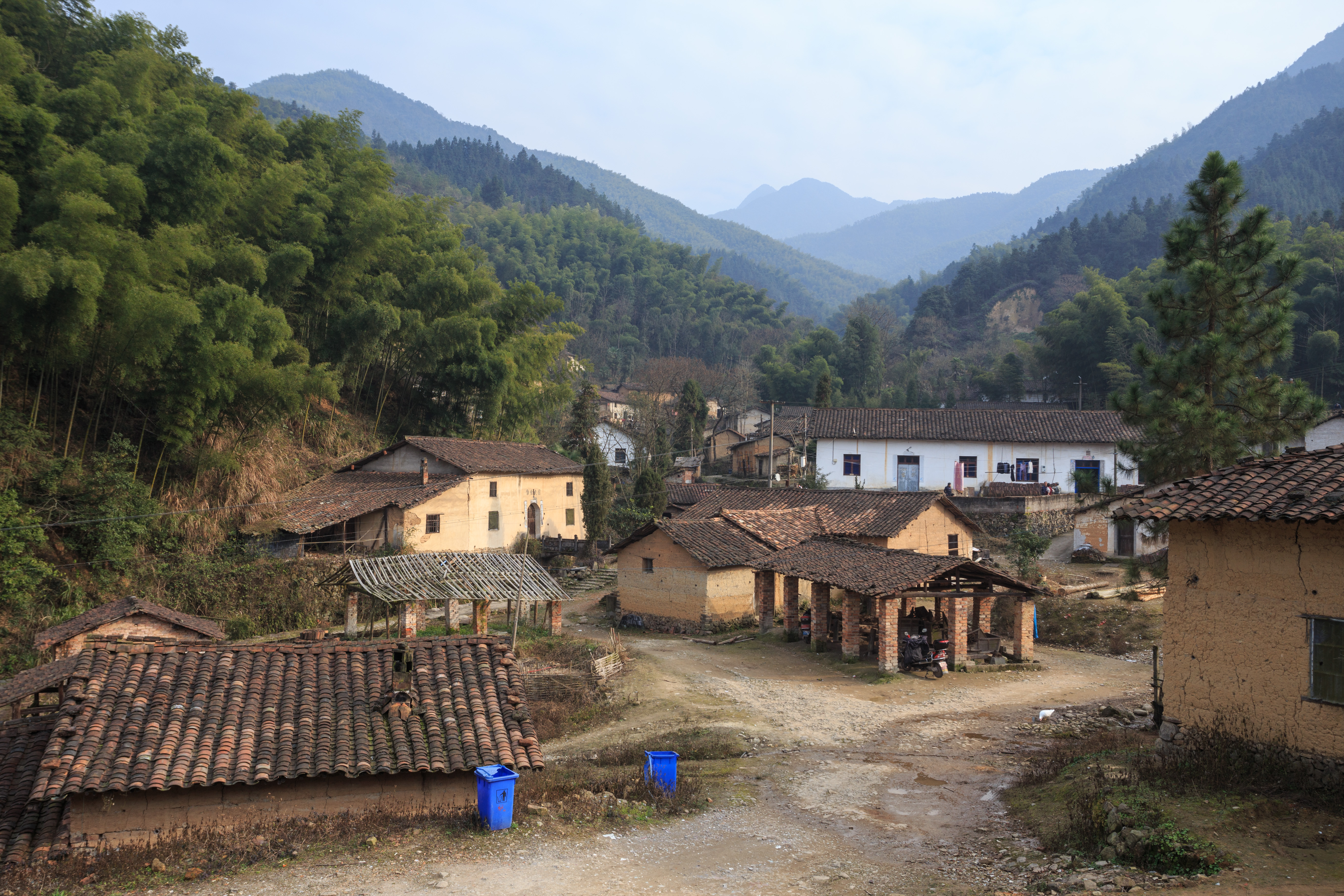 三卿口制瓷作坊